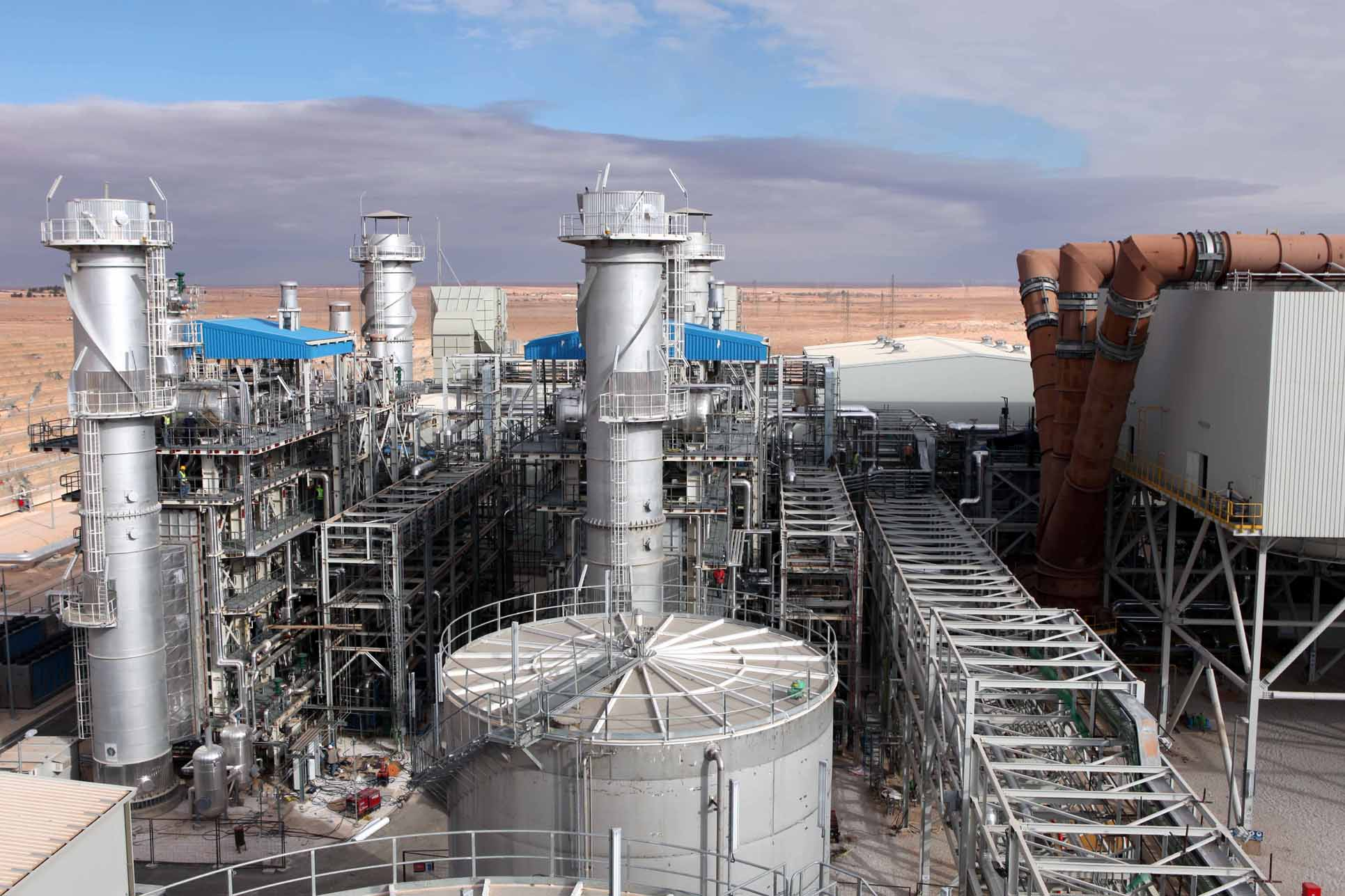 [Mohand Ouali] The Hassi R'mel power plant was recently inaugurated by Algerian and Spanish officials on July 14th. مسؤولون جزائريون وإسبانيون يدشنون محطة الطاقة بحاسي الرمل يوم 14 يوليو La centrale électrique de Hassi R'mel a été inaugurée par des autorités algériennes et espagnoles le 14 juillet.